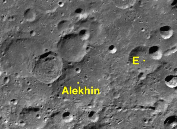 Cráter lunar Alekhin. Cráteres satélite. (Imagen LRO)